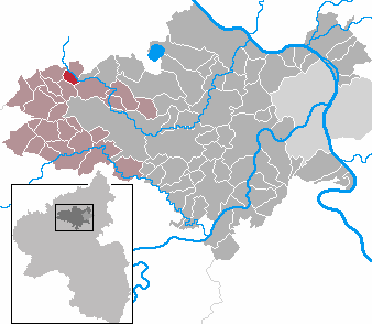 Langscheid in Rhineland-Palatinate - district Mayen-Koblenz